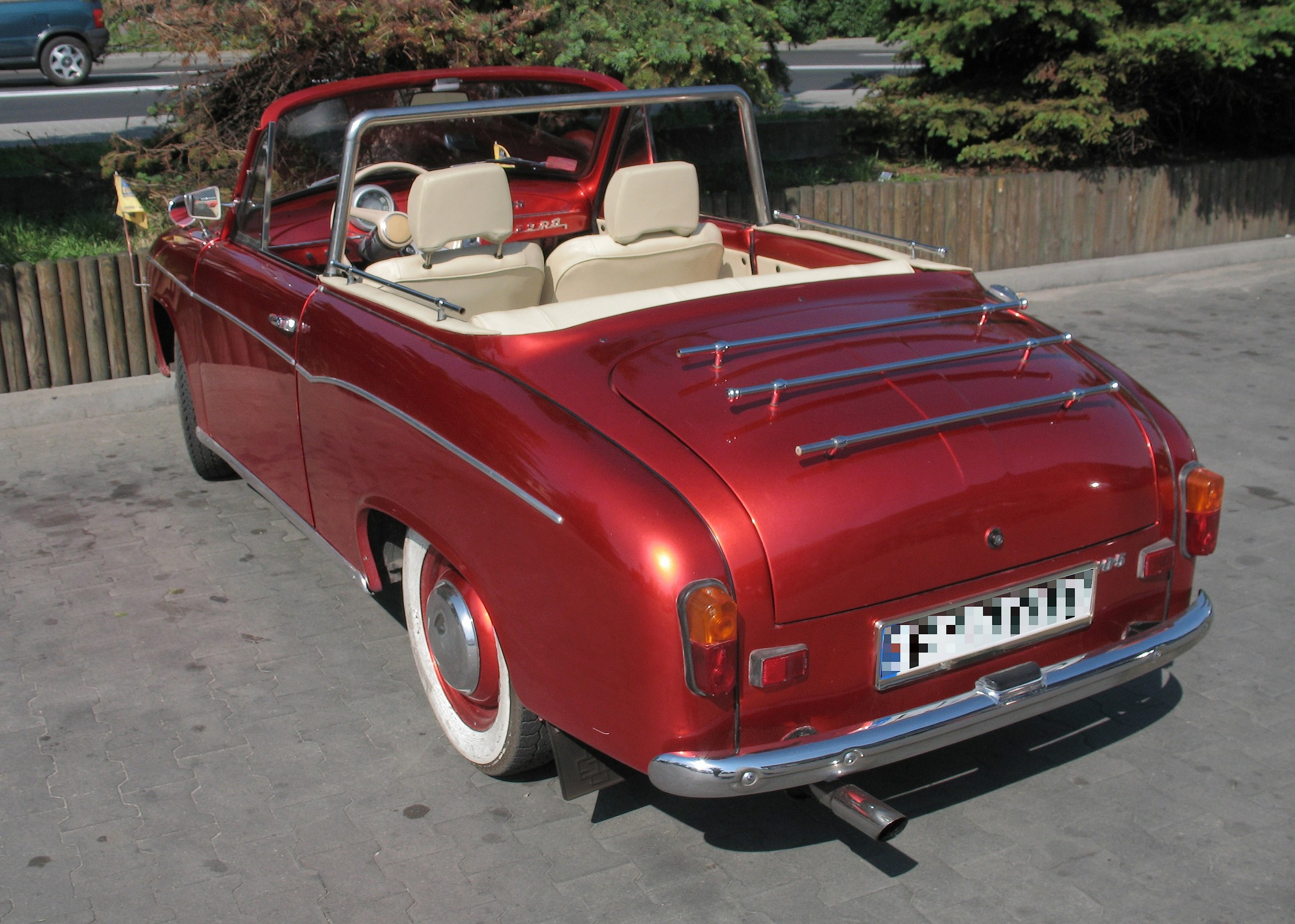 Syrena 105 przerobiona na wersję typu kabriolet z pudłem skarpet. Autor: Mohylek 05:42, 10 wrz 2007 (CEST)